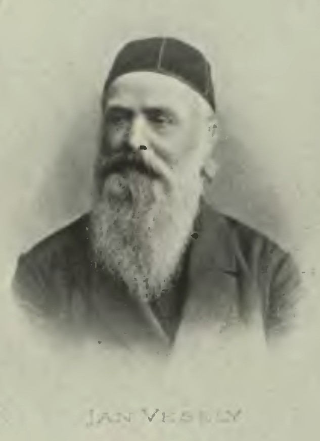 Portrét – Jan Veselý (1813 - 1889), Český reformovaný kazatel.